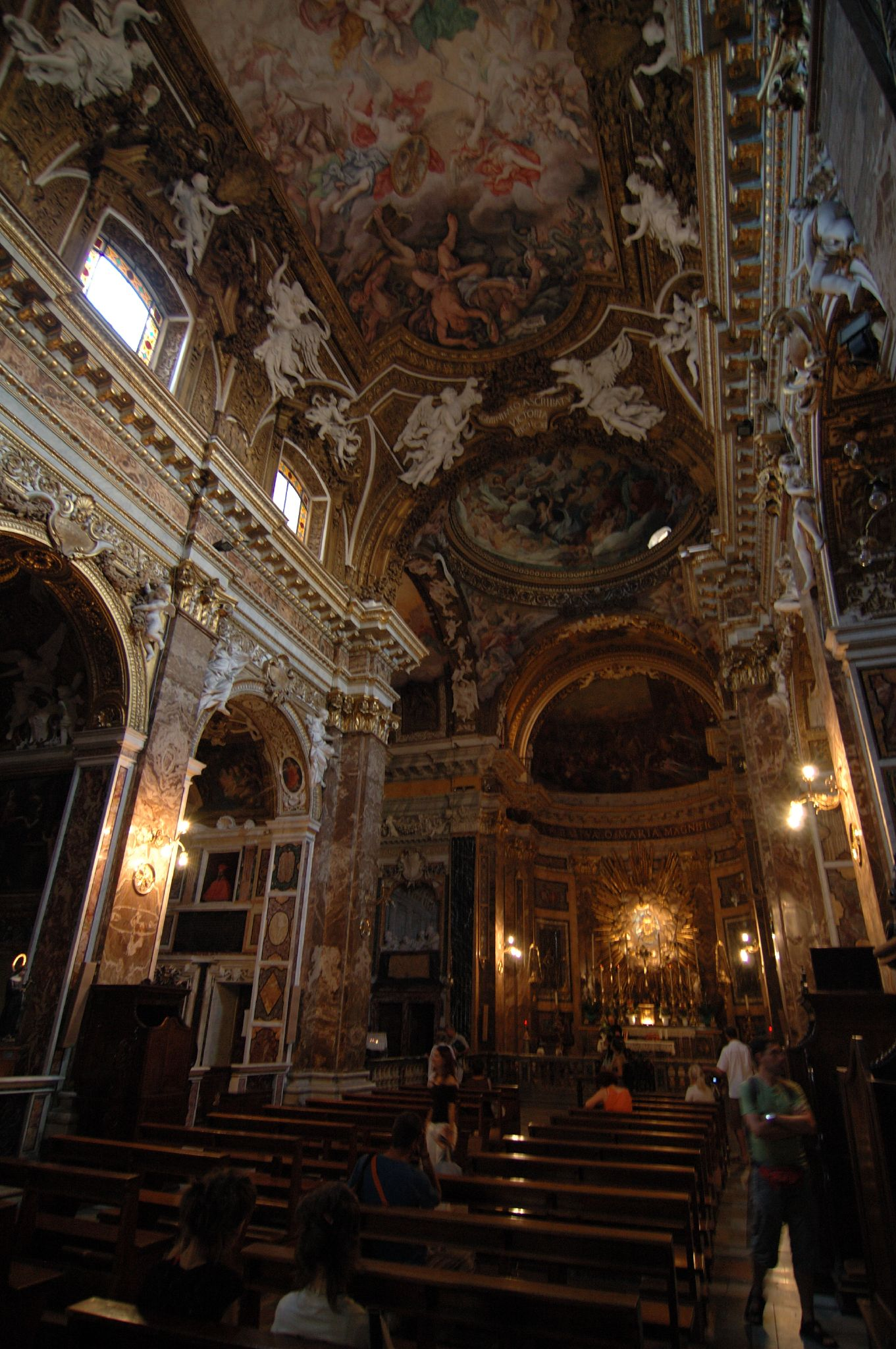 Santa Maria della Vittoria